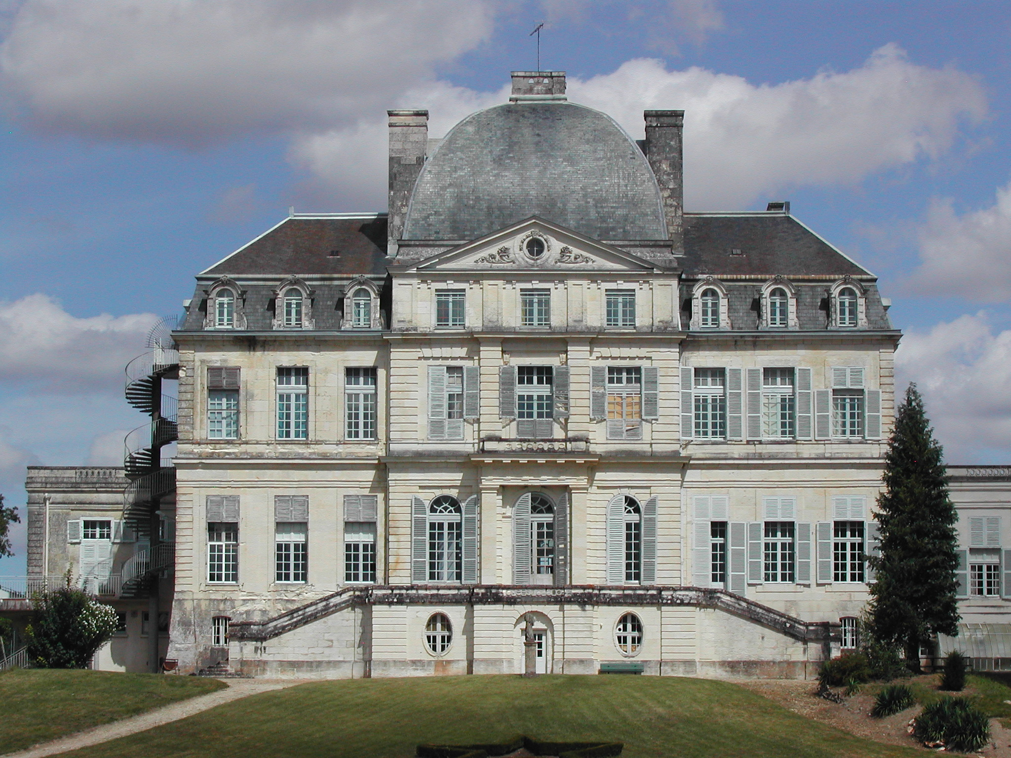 le château neuf de Verneuil sur Indre a été construit pour Eusèbe Félix Chaspoux, second marquis de Verneuil, introducteur des ambassadeurs et des princes étrangers à la cour de Louis XV. Il est attribué à l'architecte Jean Baptiste Mansart de Jouy : Construit de 1747 à 1756, les travaux ont englobé la grosse tour et une partie du logis achevé en 1508 situé à l'angle sud-ouest, et le château vieux, relié par un corridor terrassé au neuf, avait été unifié stylistiquement avec le château neuf.